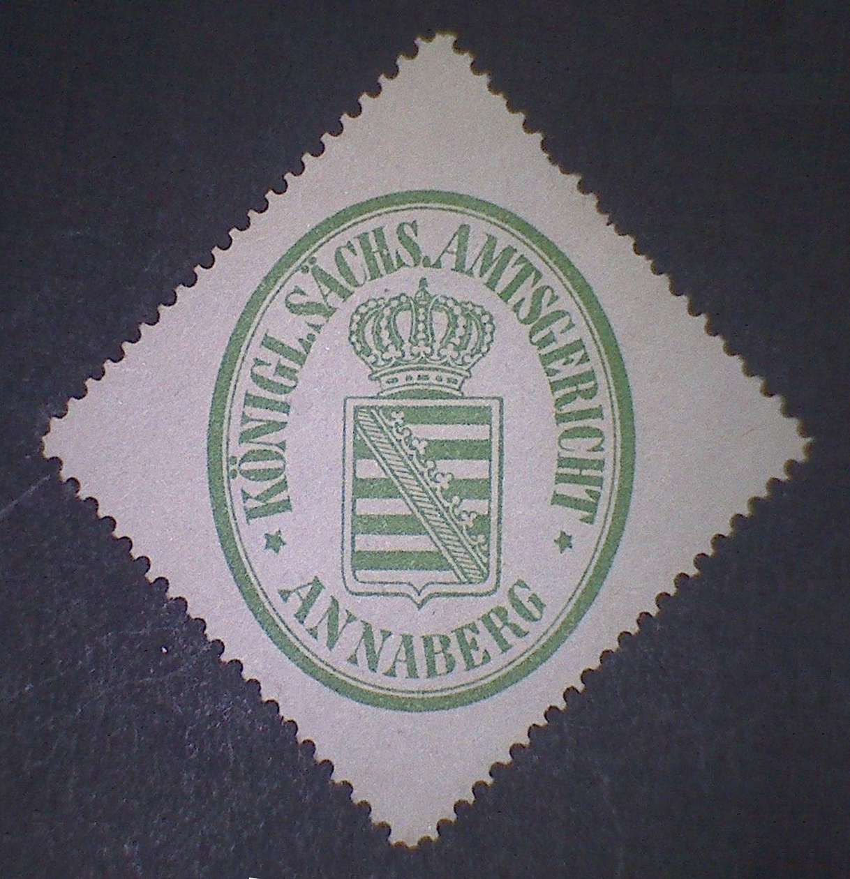 Siegermarke des Königlich sächsischen Amtsgericht Annaberg